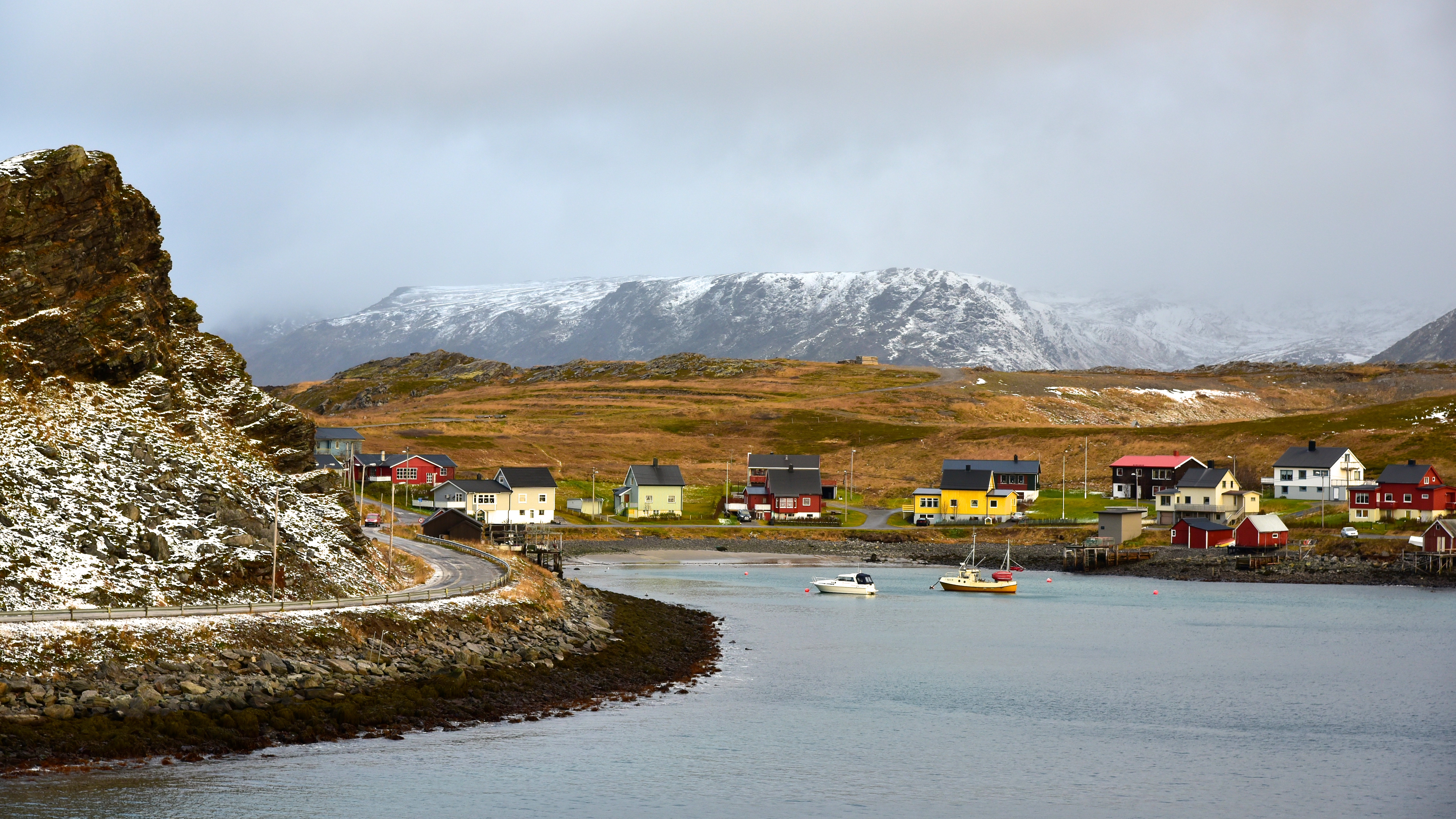 Hurtigruten Ferry / Cruise